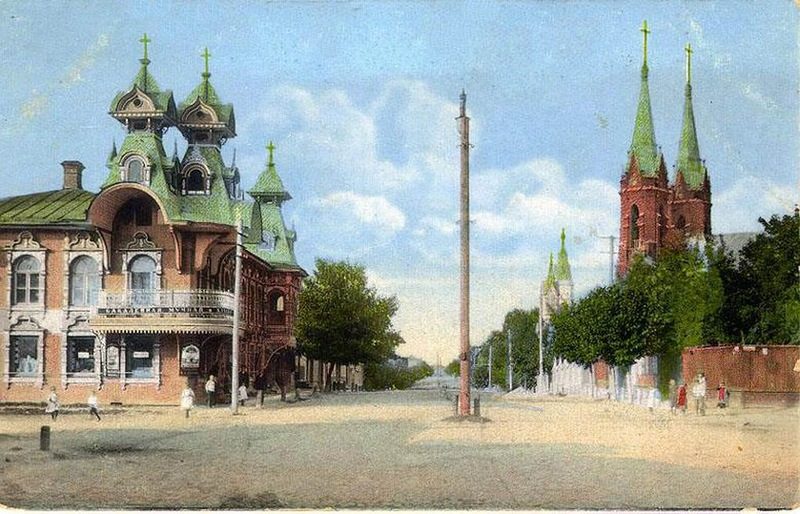 Дом купца Гордеева и костел в Рыбинске на фотографии С.М. Прокудина-Мирского, 1907 год, из серии "Достопримечательности Российской Империи".